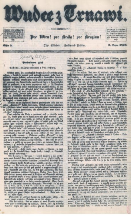 Wudce z Trnavi je týždenníkom, ktorý vychádzal v Trnave v r. 1848.